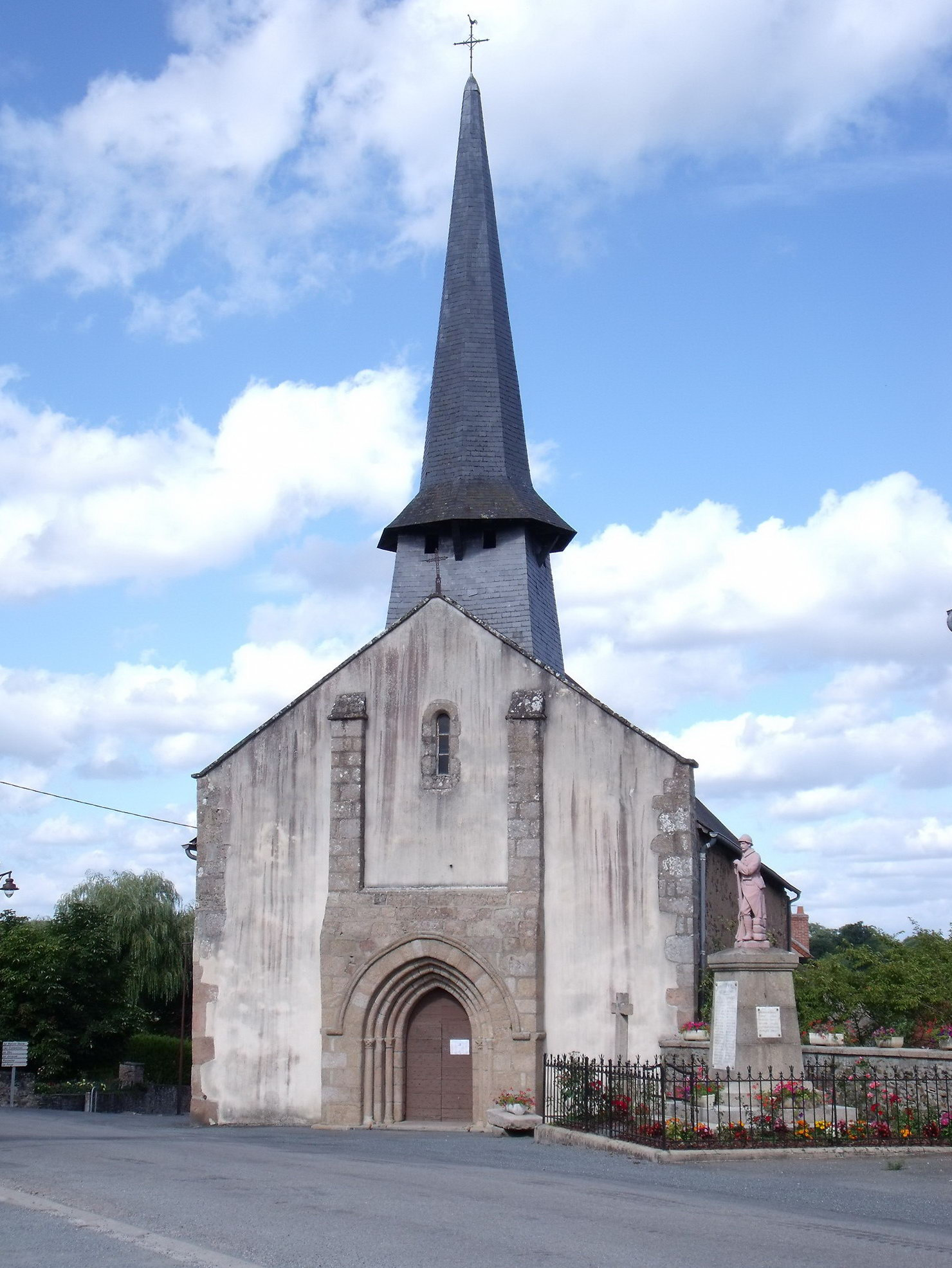 La Cellette - le soldat rose